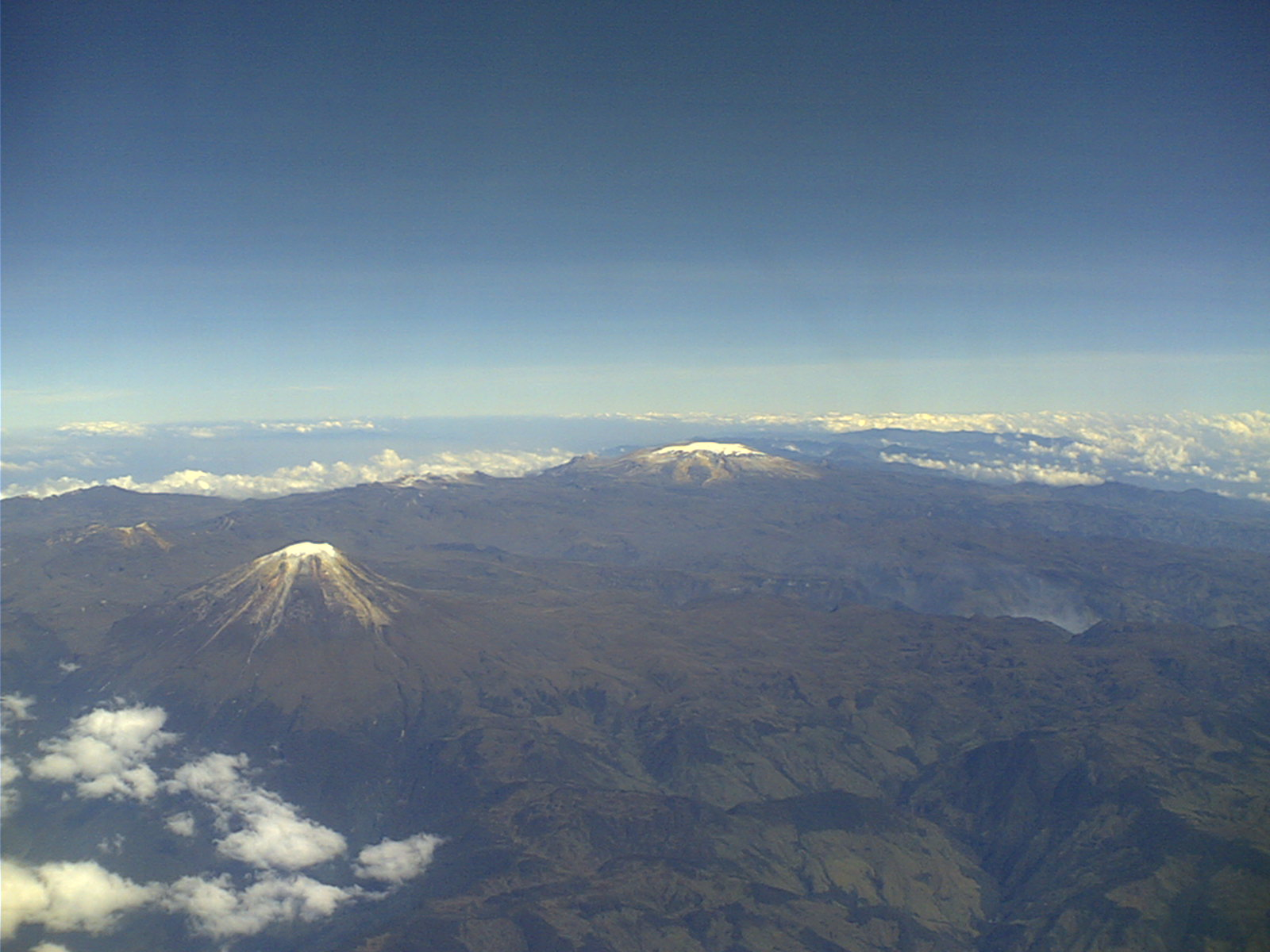 Parque Nacional Los Nevados 2007